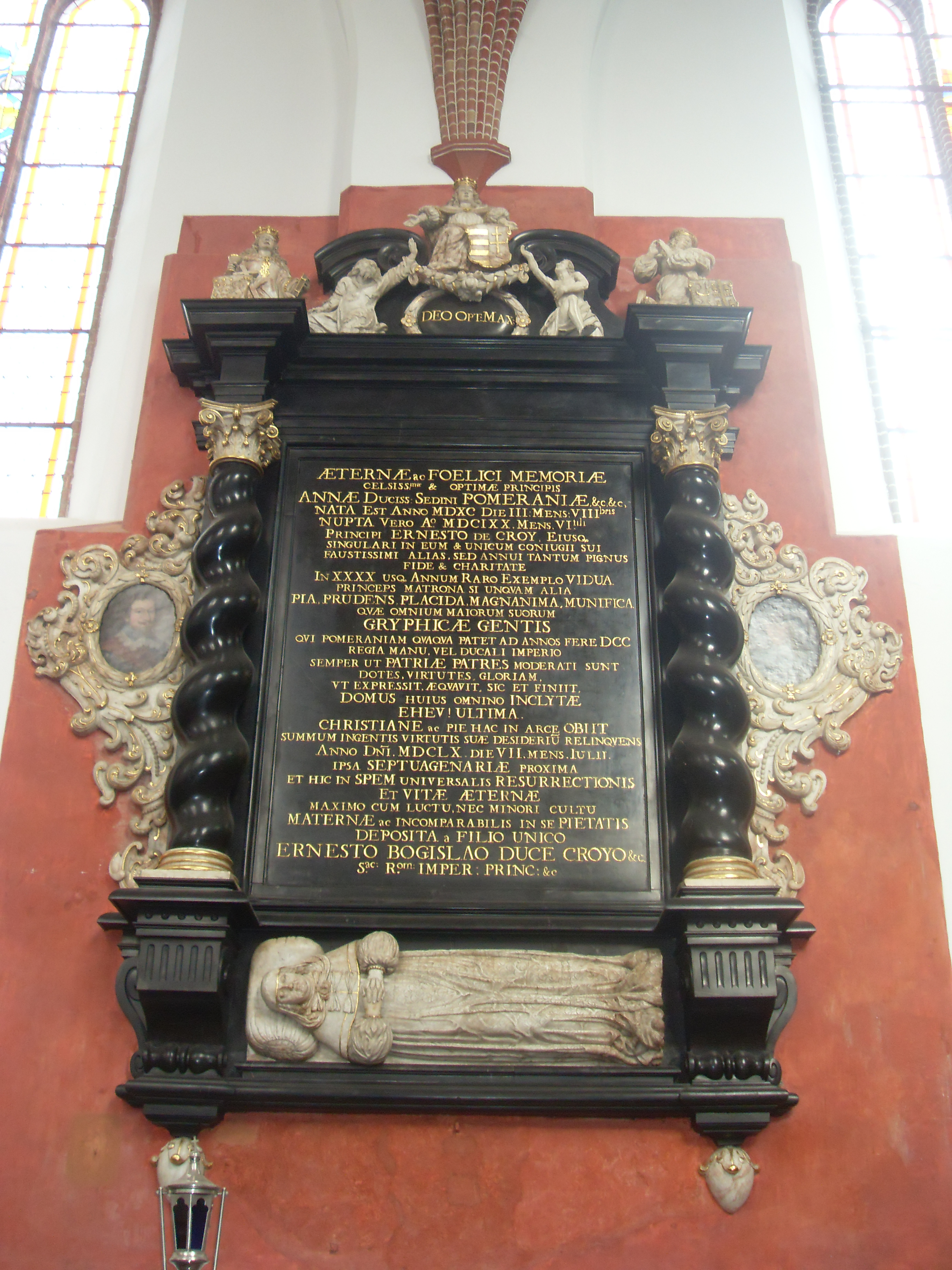 Słupsk, ul. Dominikańska 3 - dawny kościół klasztorny dominikanów (zamkowy, przed 1945 p.w. św. Jana Chrzciciela), obecnie rzymskokatolicki kościół parafialny pw. św. Jacka, 1 poł. XV, 1602, 1777-1779, 1875, 1892,1900, 1946 (grobowiec Anny de Croy z kościoła św. Jacka w Słupsku)